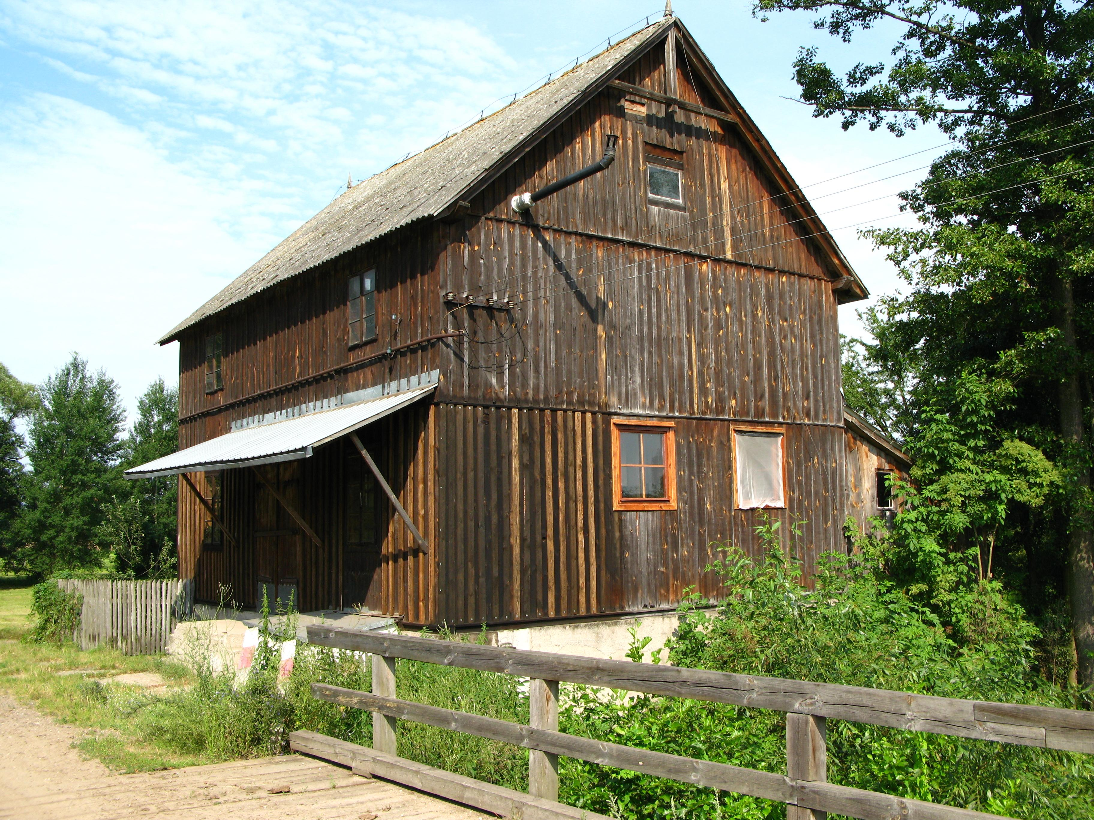 Zabytkowy młyn po drugiej stronie Kosówki